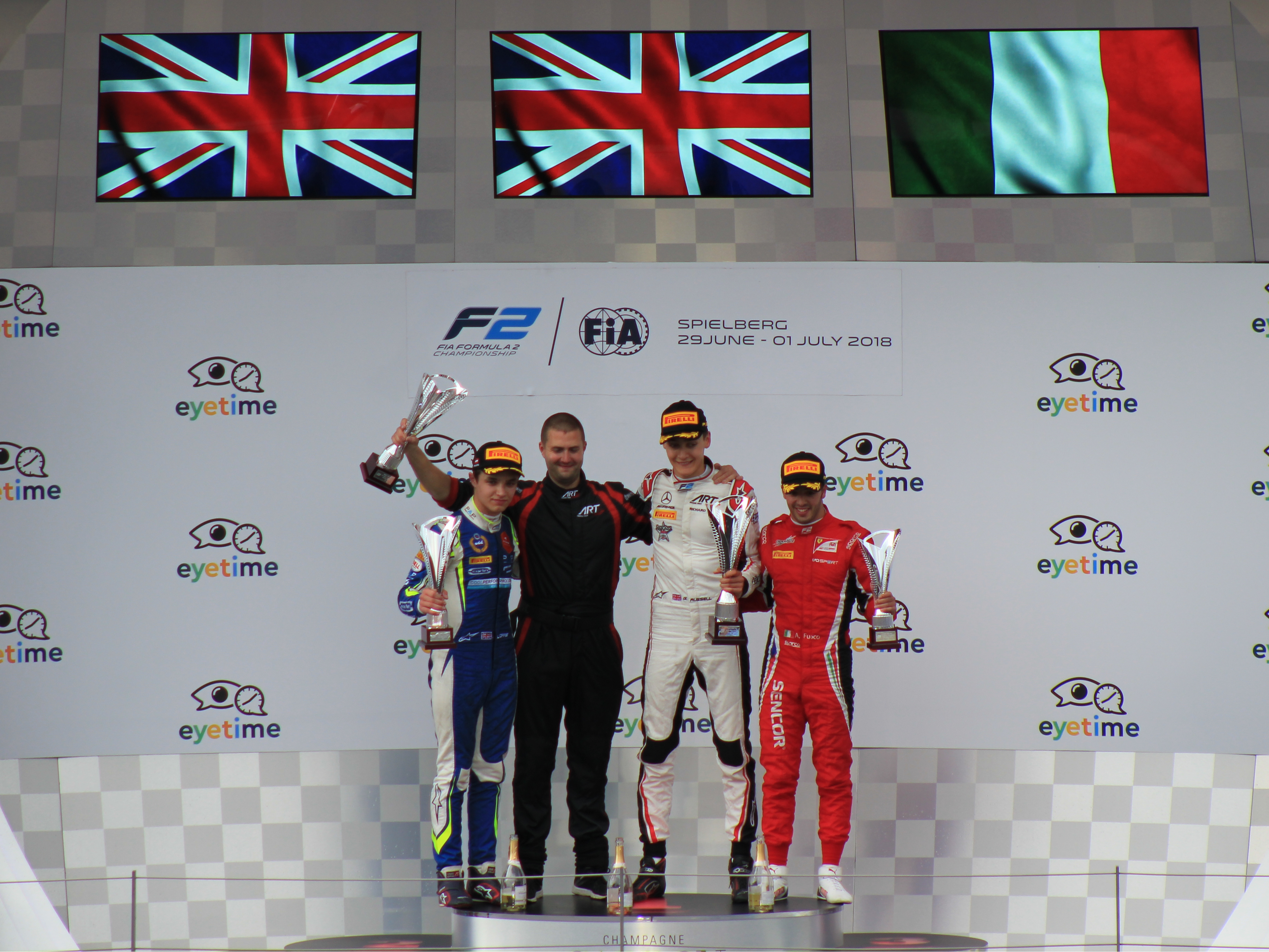 Nach dem ersten Rennen in Österreich 2018